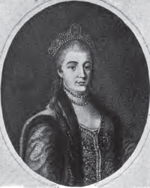 Т.М. Троепольская (1744 - 1774) - русская актриса